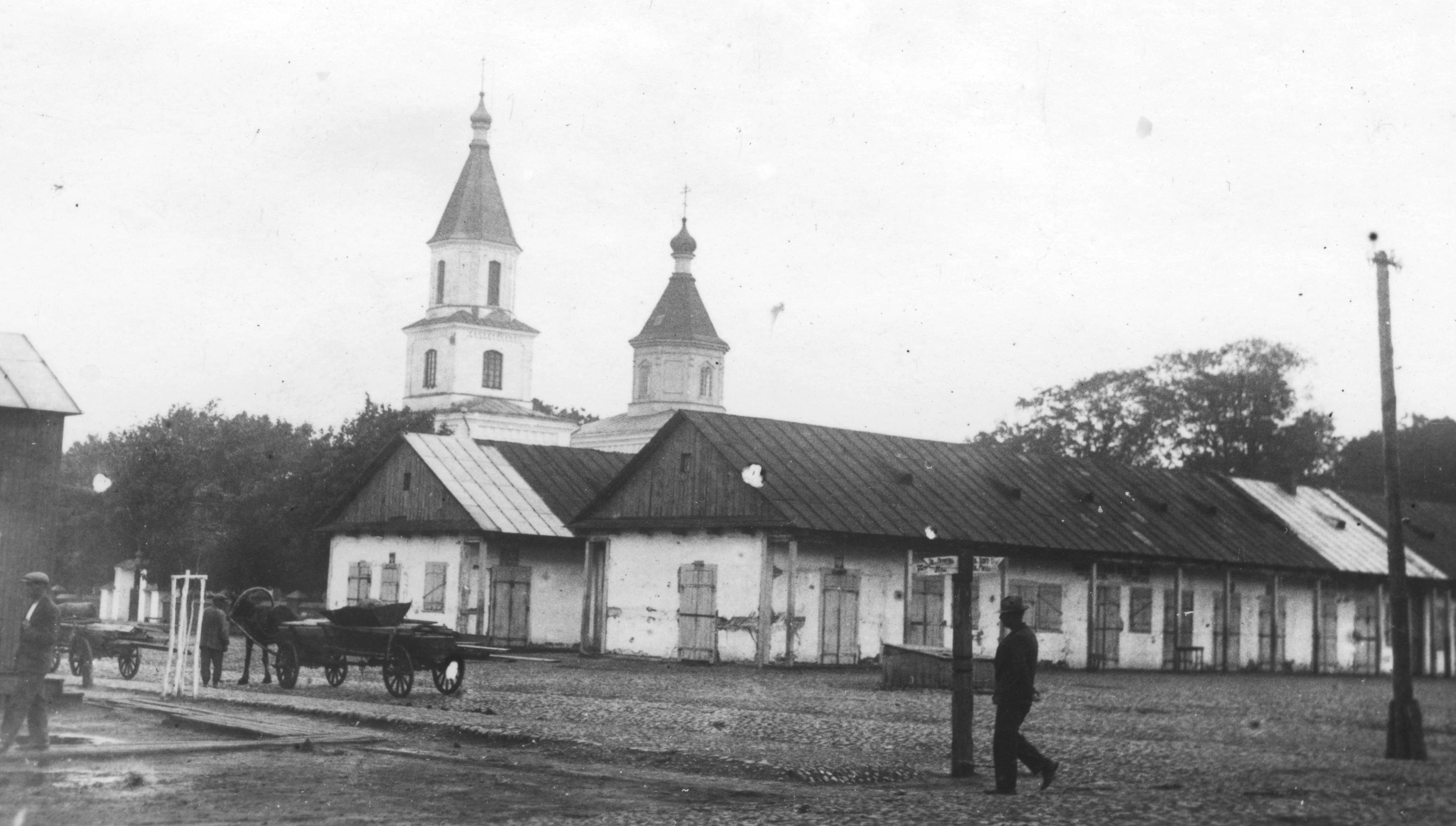 Беларуская (тарашкевіца): Янаў (Janaŭ), пляц Рынак (plac Rynak). Царква